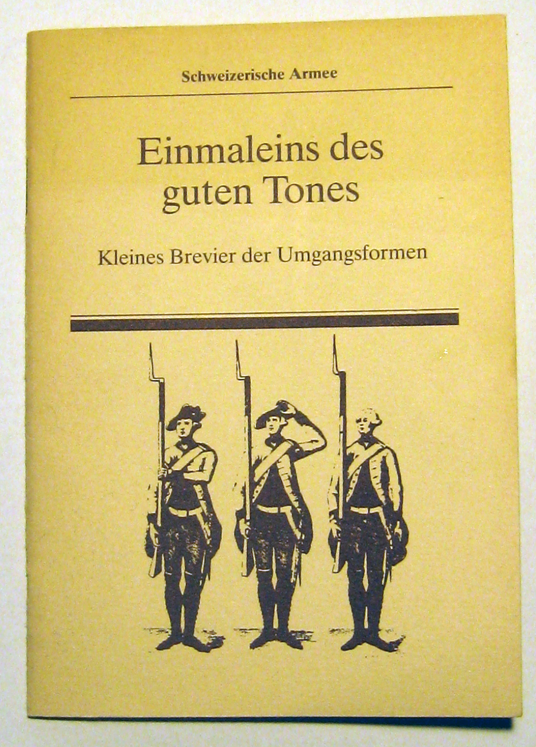 Reglement 97.80 d der Schweizer Armee